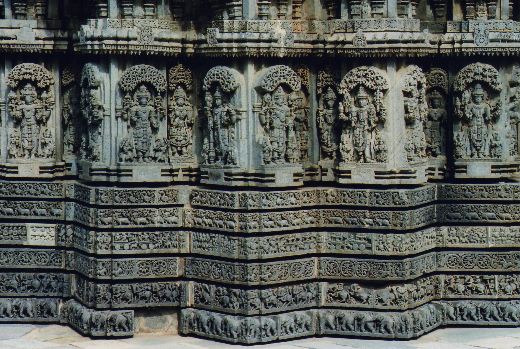 Chennakeshava (also called Keshava or Kesava) Temple at Somanathapura, Karnataka, India